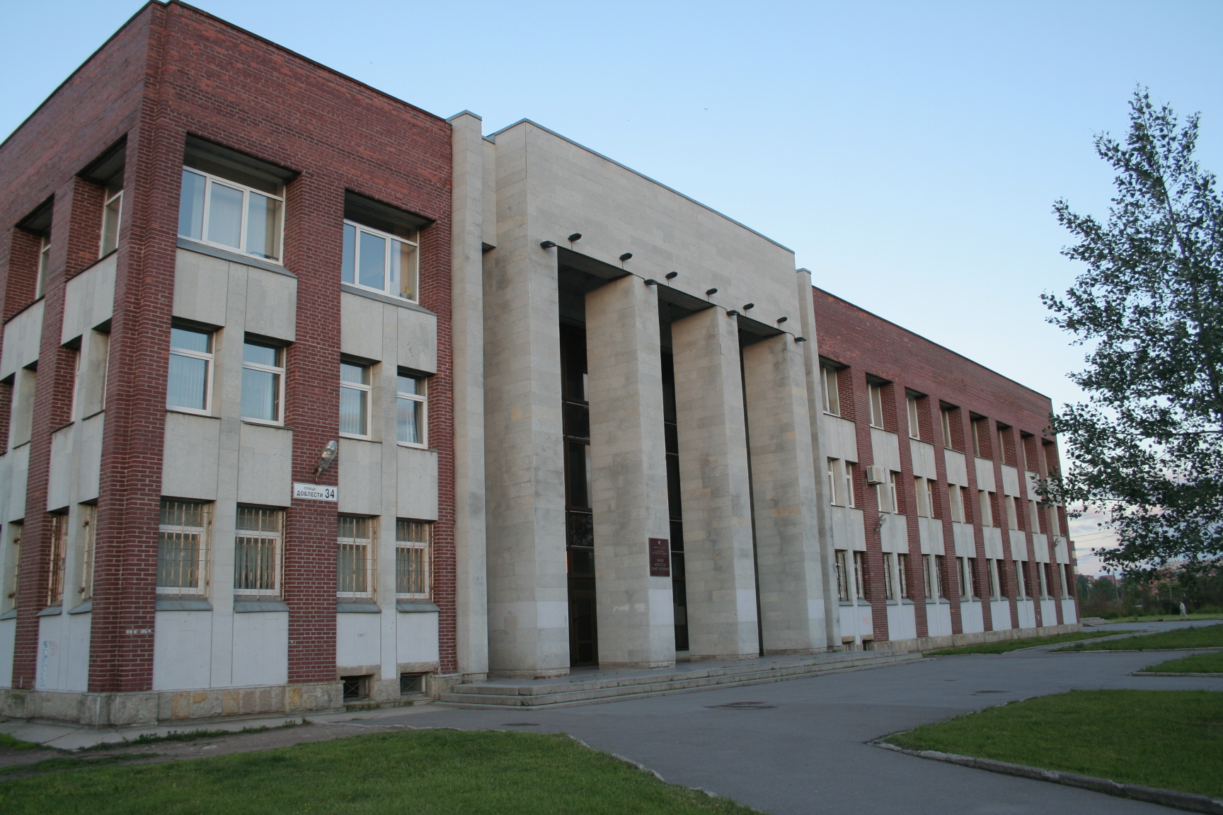 2007-06-27 22-38-54 Лицей Искусств